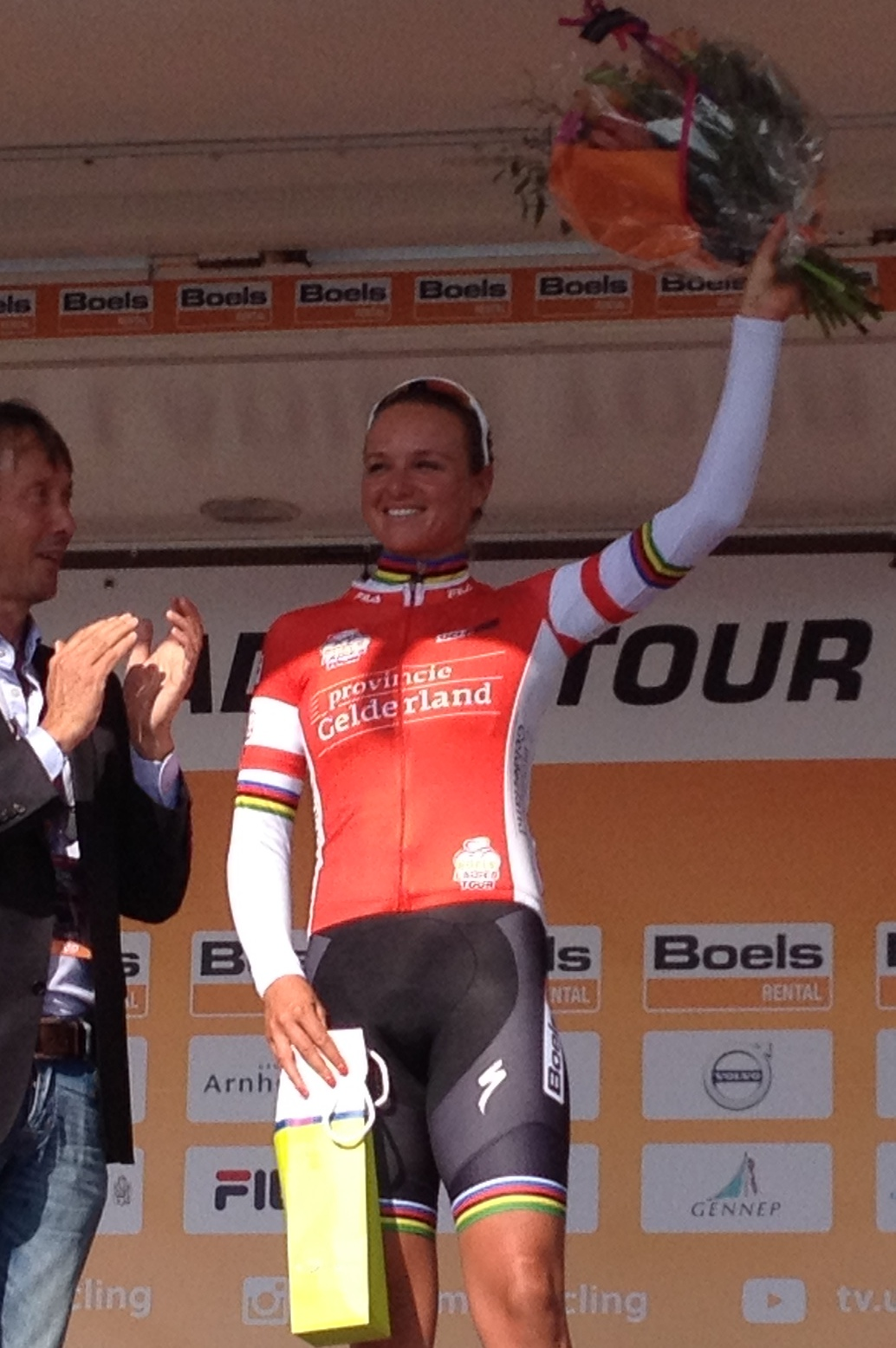 5e etappe van de Boels Ladies Tour 2018 door Zuid-Limburg, finish in Sittard op het Tom Dumoulin Bike Park. Chantal Blaak was de meest strijdlustige.